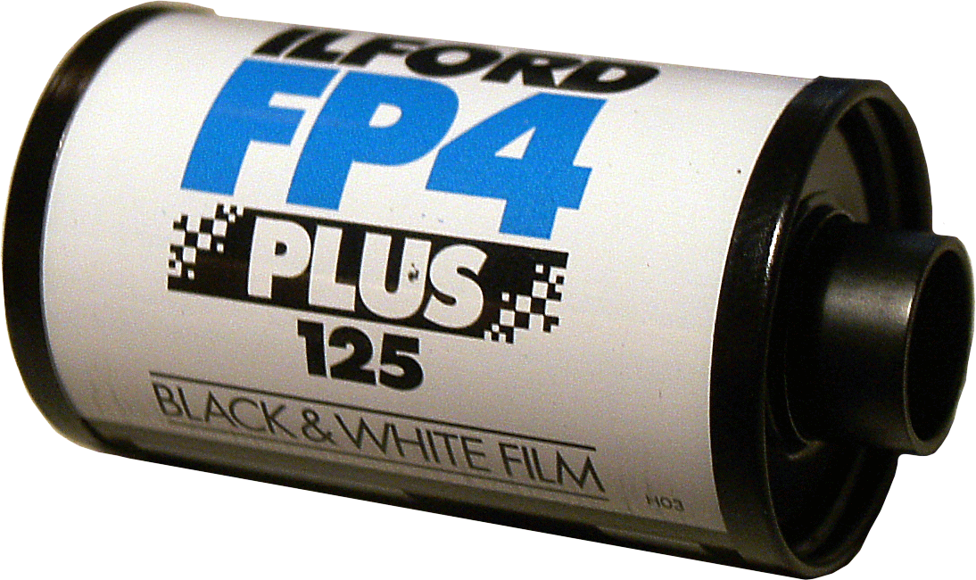 Filmpatrone Schwarzweißfilm 135